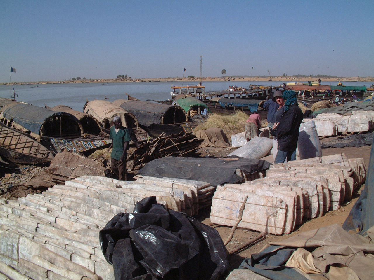 Les plaques de sel de Taoudéni, venant d'être déchargées au port fluvial de Mopti (Mali).